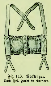 Fig. 113. Rockträger. Nach Frl. Hardt in Dresden.